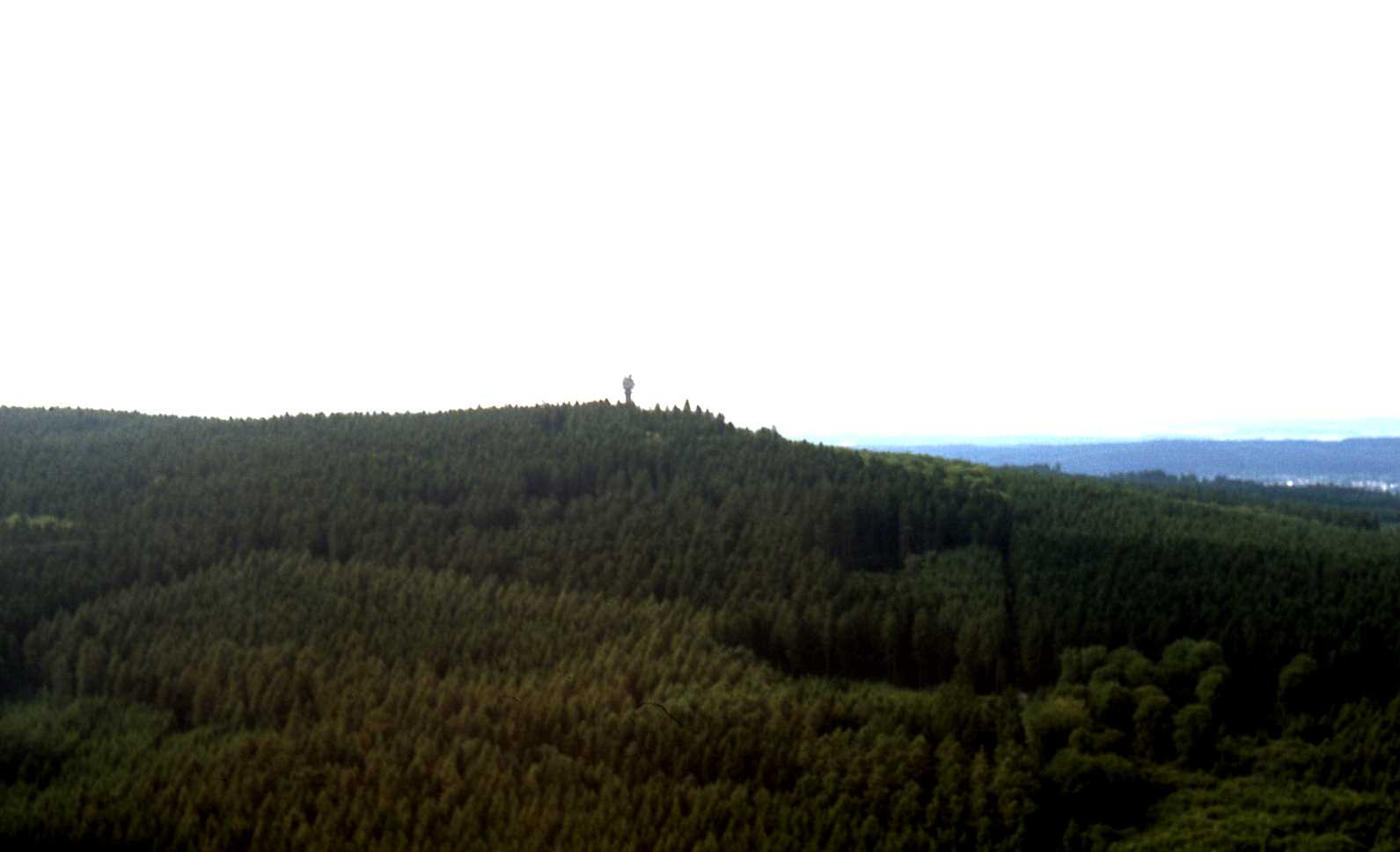 Köppel mit Fernmeldeturm (Luftaufnahme)